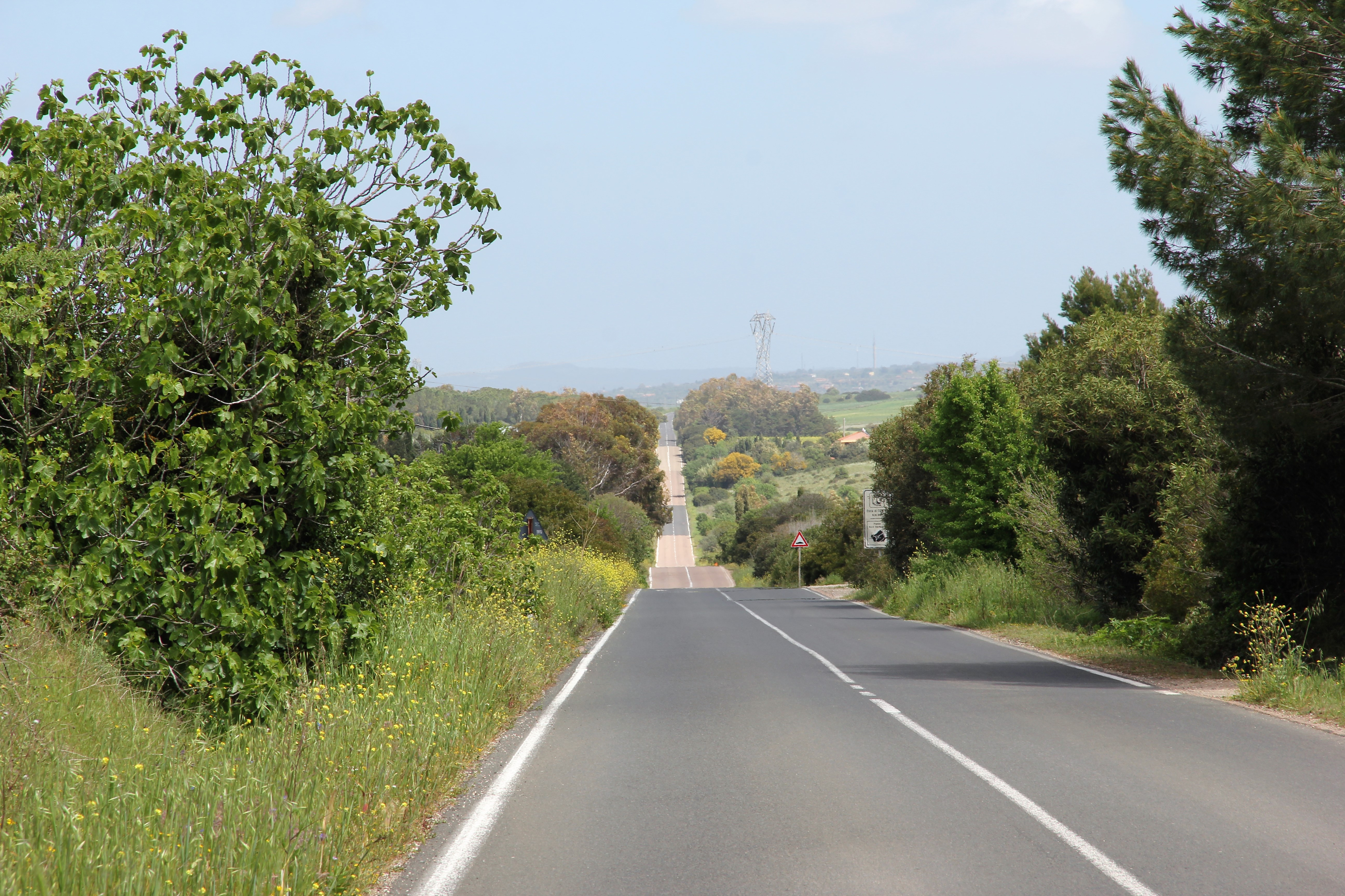 strada statale 291 in agro di sassari